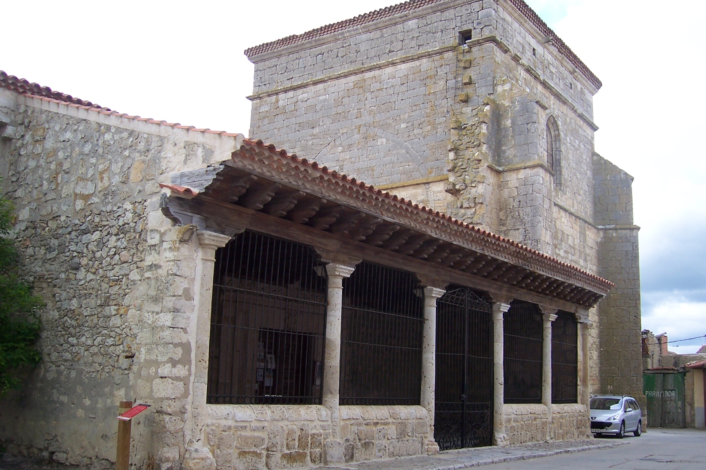 Iglesia de Santa María de la Espectación en la localidad de Peñaflor de Hornija (Valladolid, España).